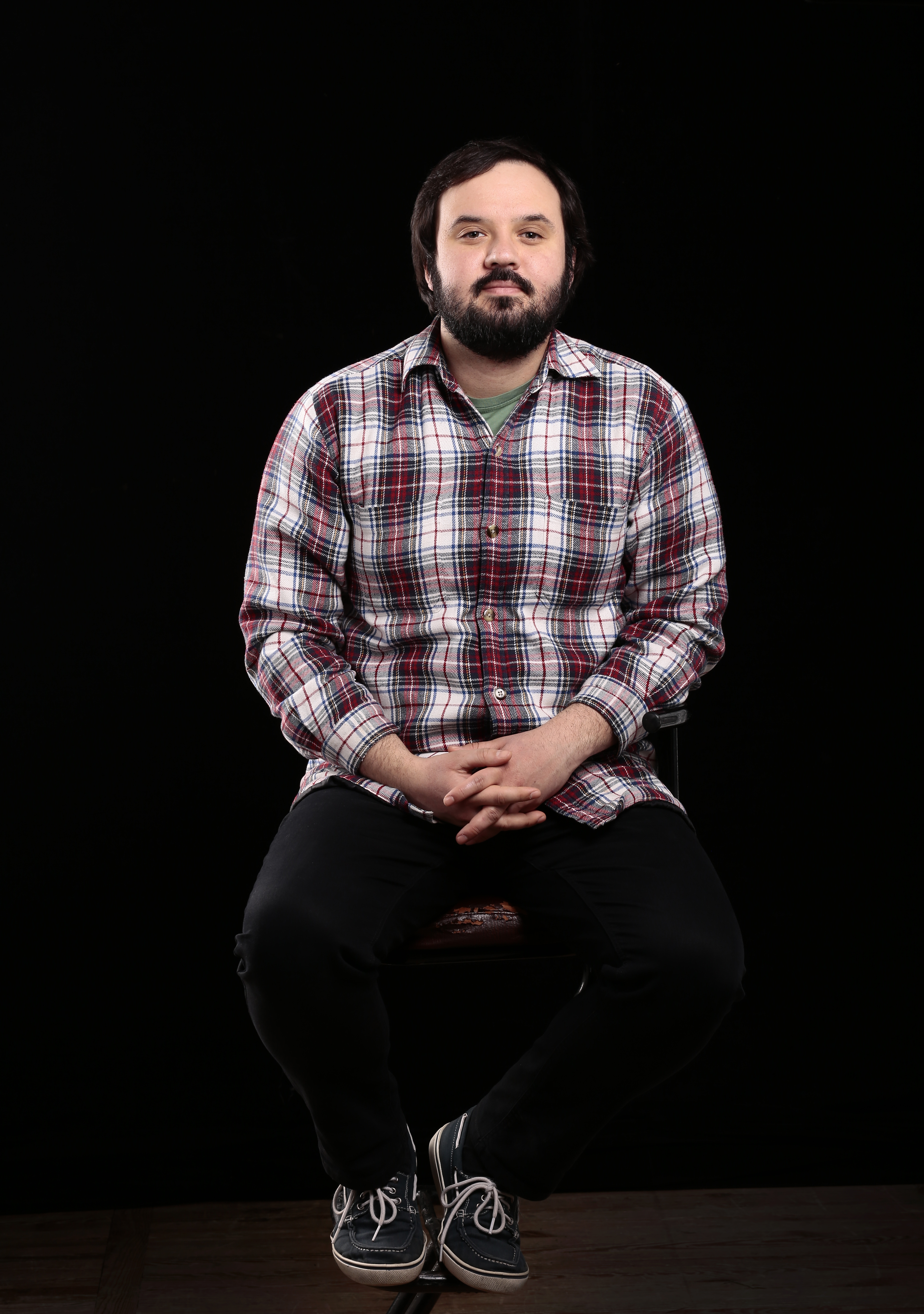 Дмитро Гусаков, Головний режисер, театр М.Старицького. м. Хмельницький